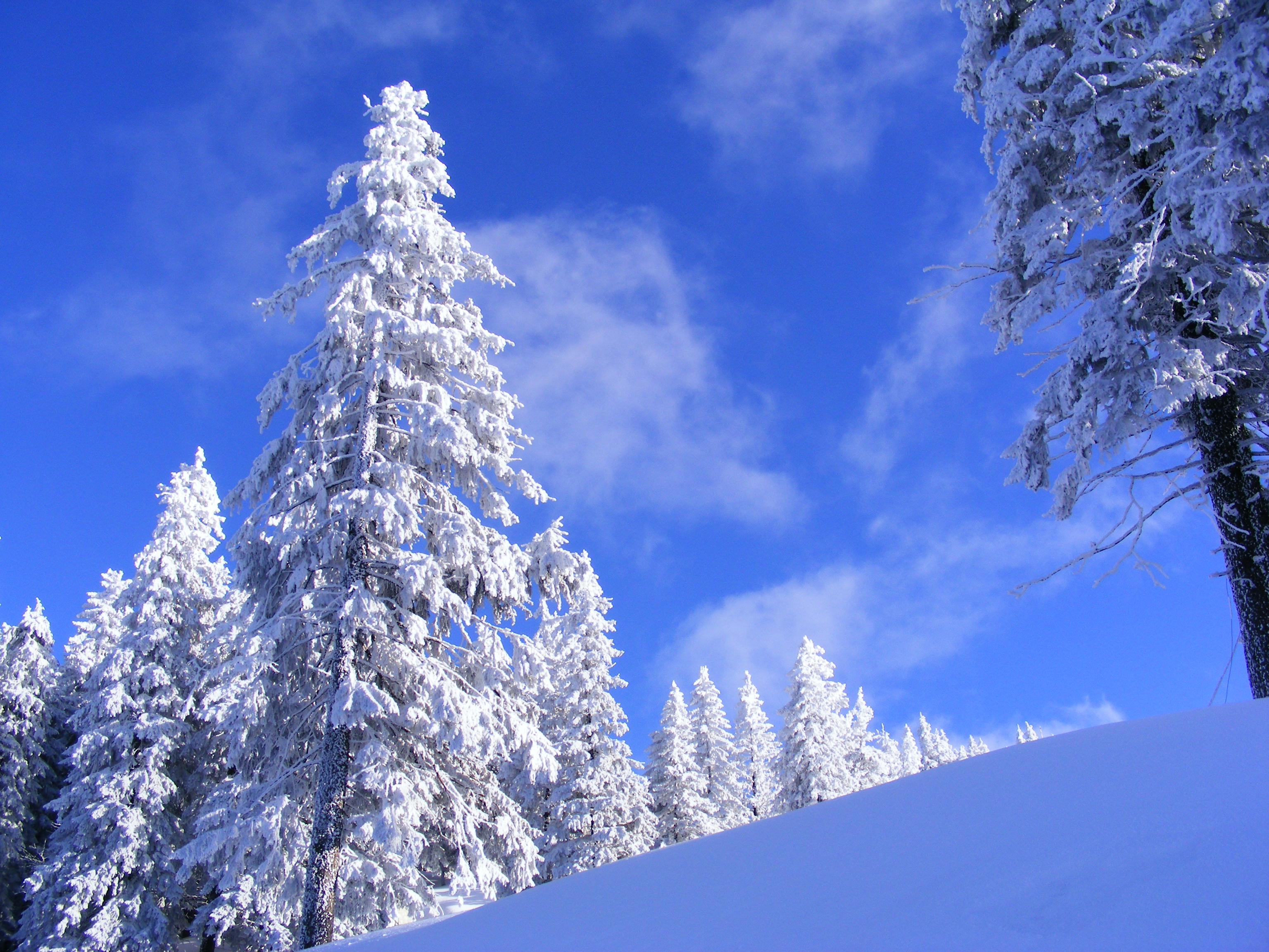 Postavaru Mountain - ROMANIA